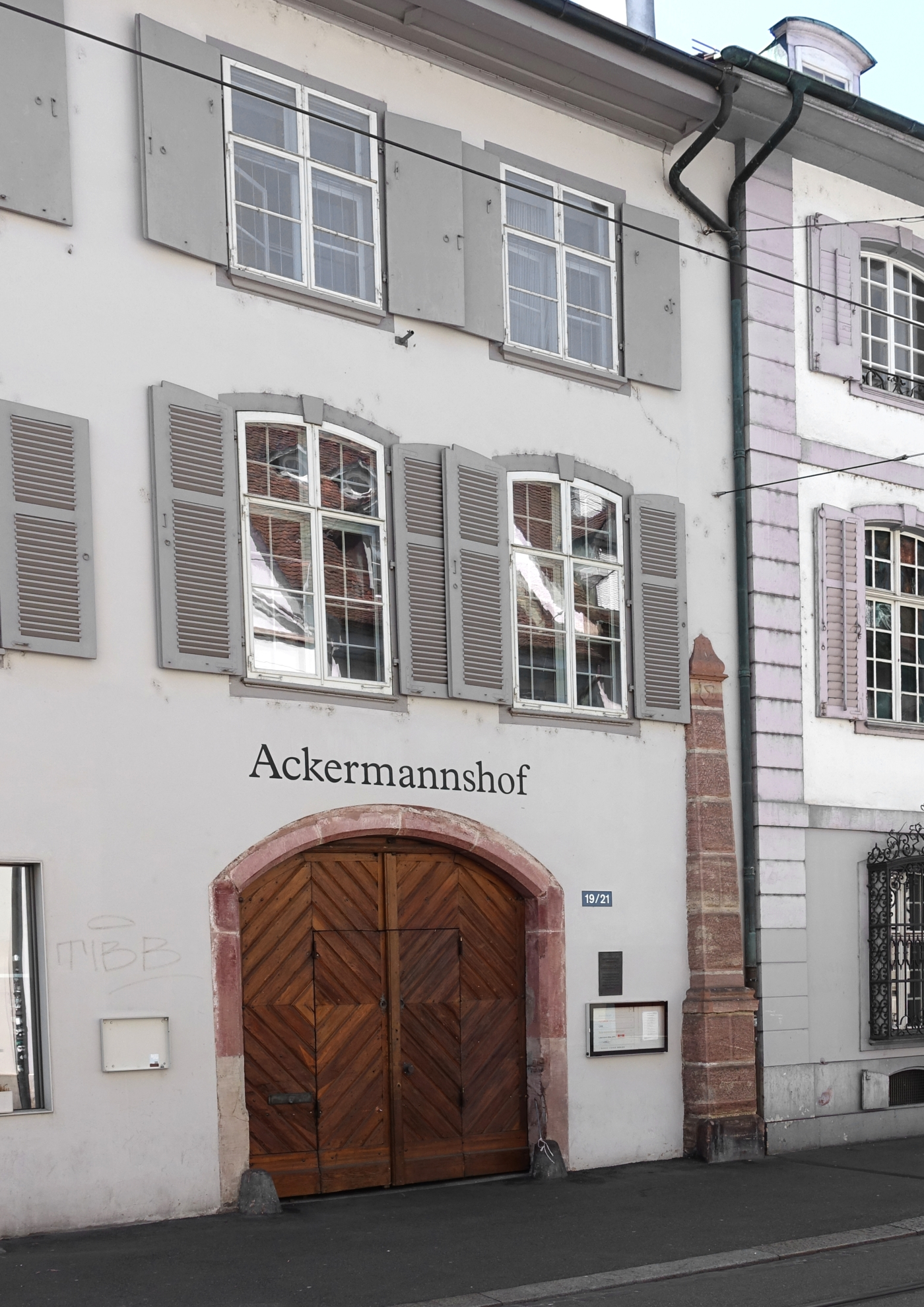 Geburtshaus von Johannes Petri (1441-1511) an der St. Johanns-Vorstadt 19-21 in Basel